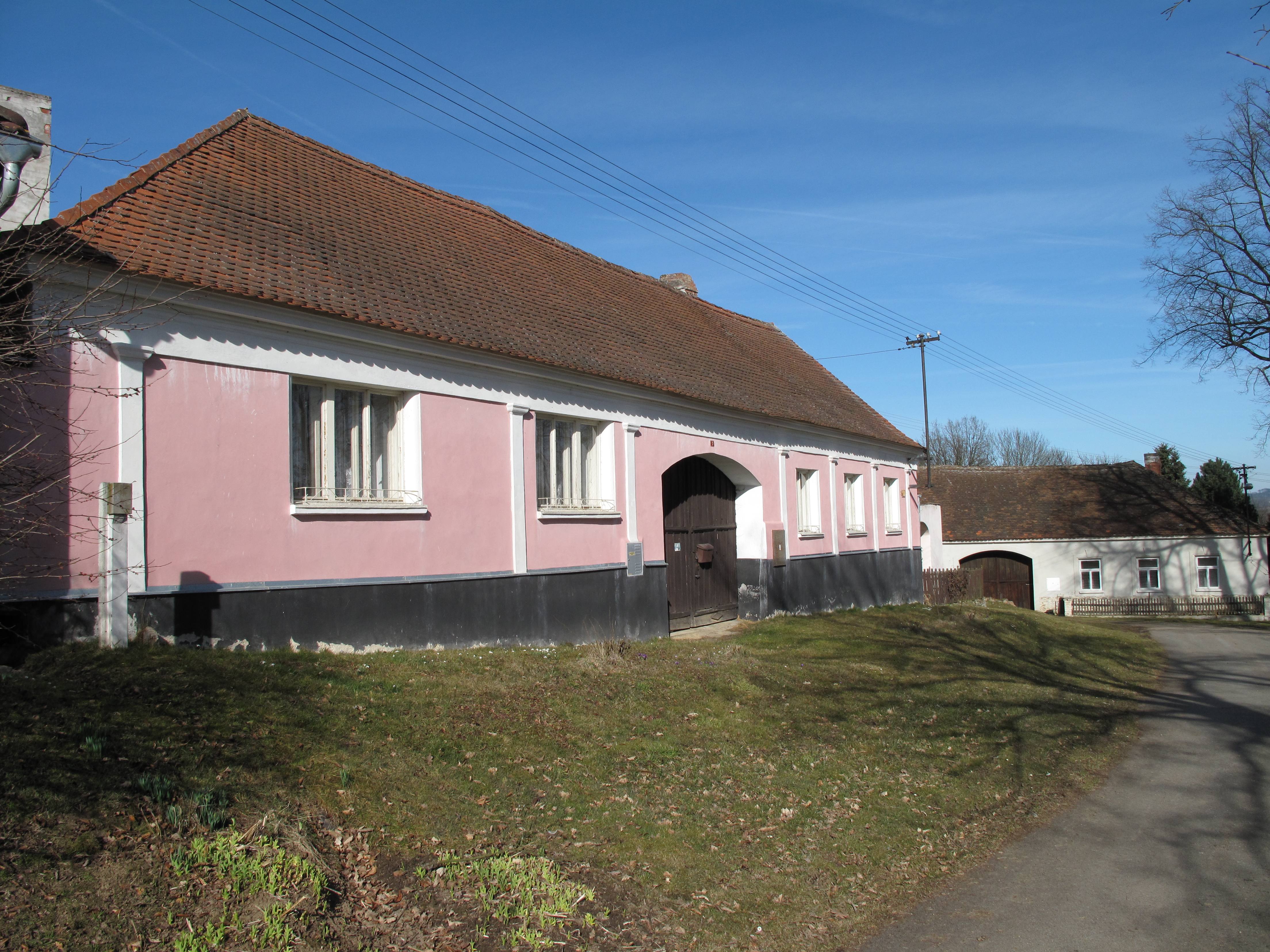 Dům v Žíchovci. Okres Prachatice, Česká republika.